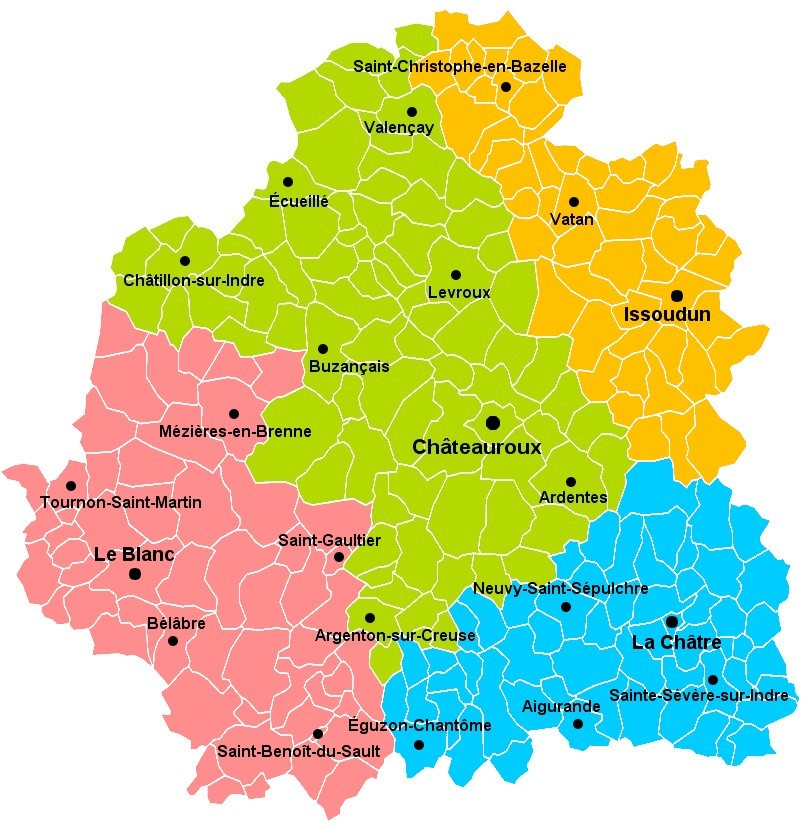 Carte des communes de l'Indre (36) : Arrondissements de l'Indre.